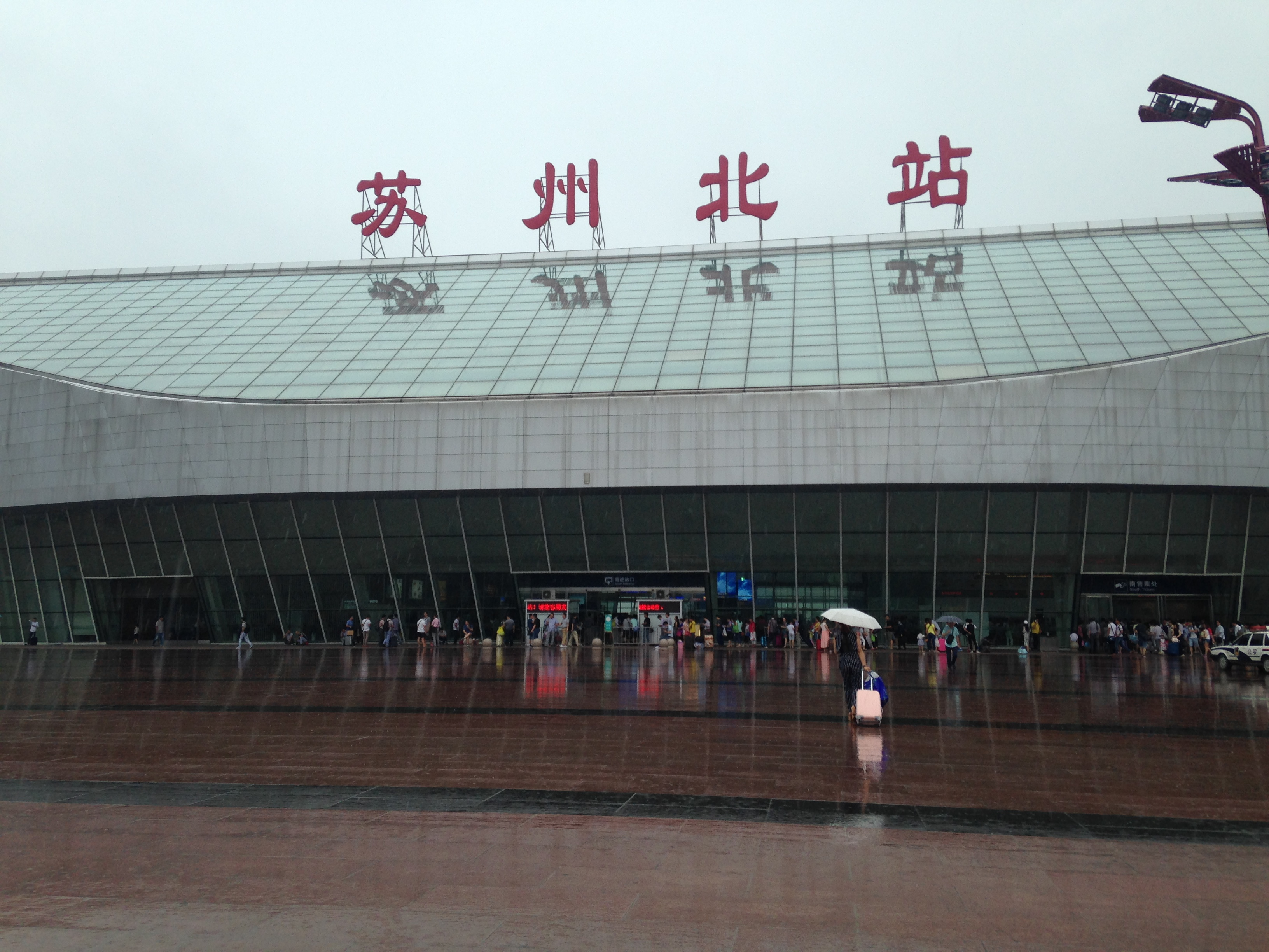 蘇州北駅の駅舎